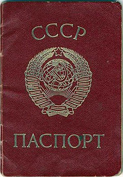 паспорт гражданина СССР, образца 1974 / Pasaporte interno de la URSS, año 1974